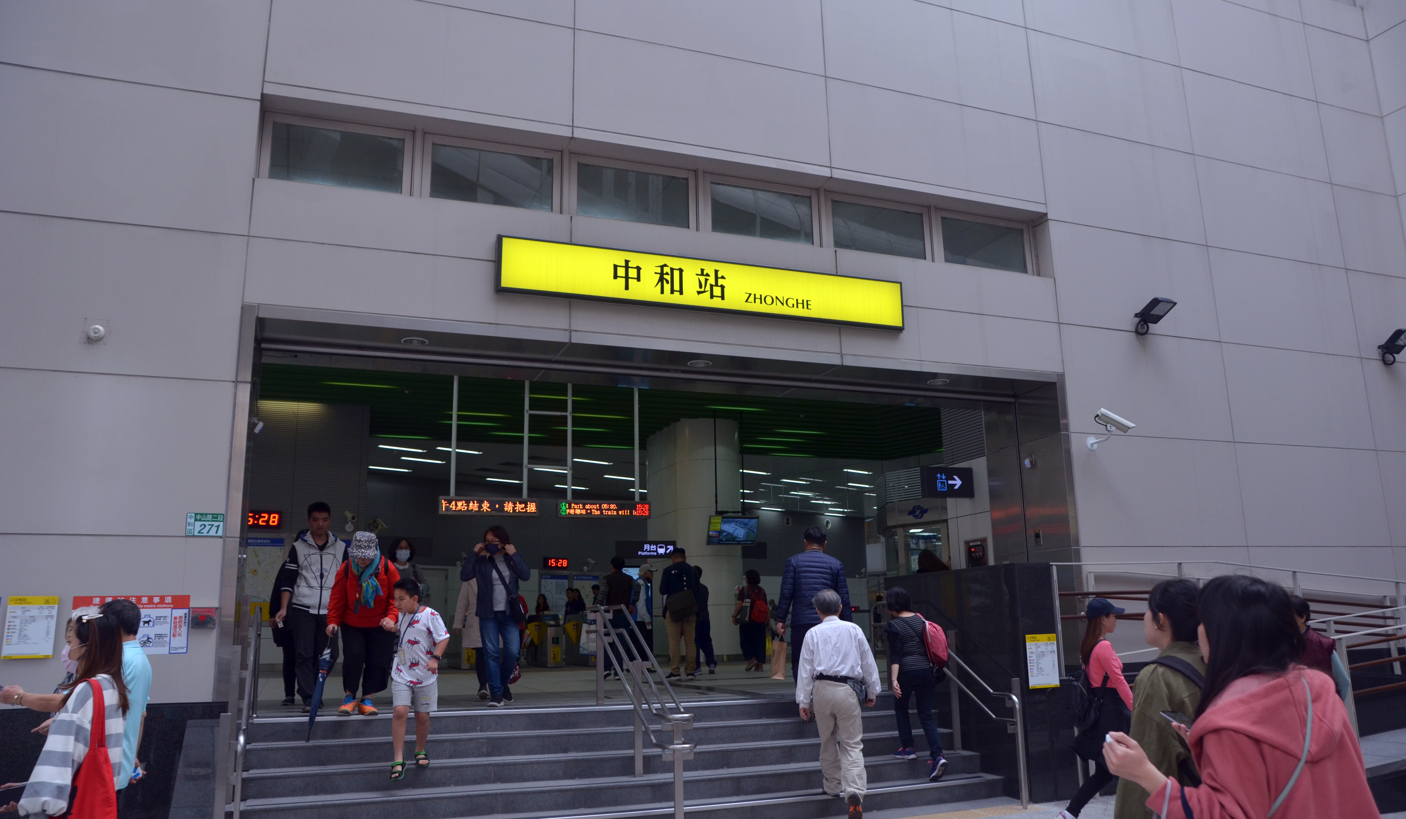 中文（台灣）: 台北捷運環狀線中和站出口。